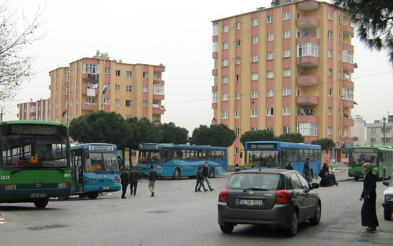 Fotoğraf tarafımdan çekilmiştir.